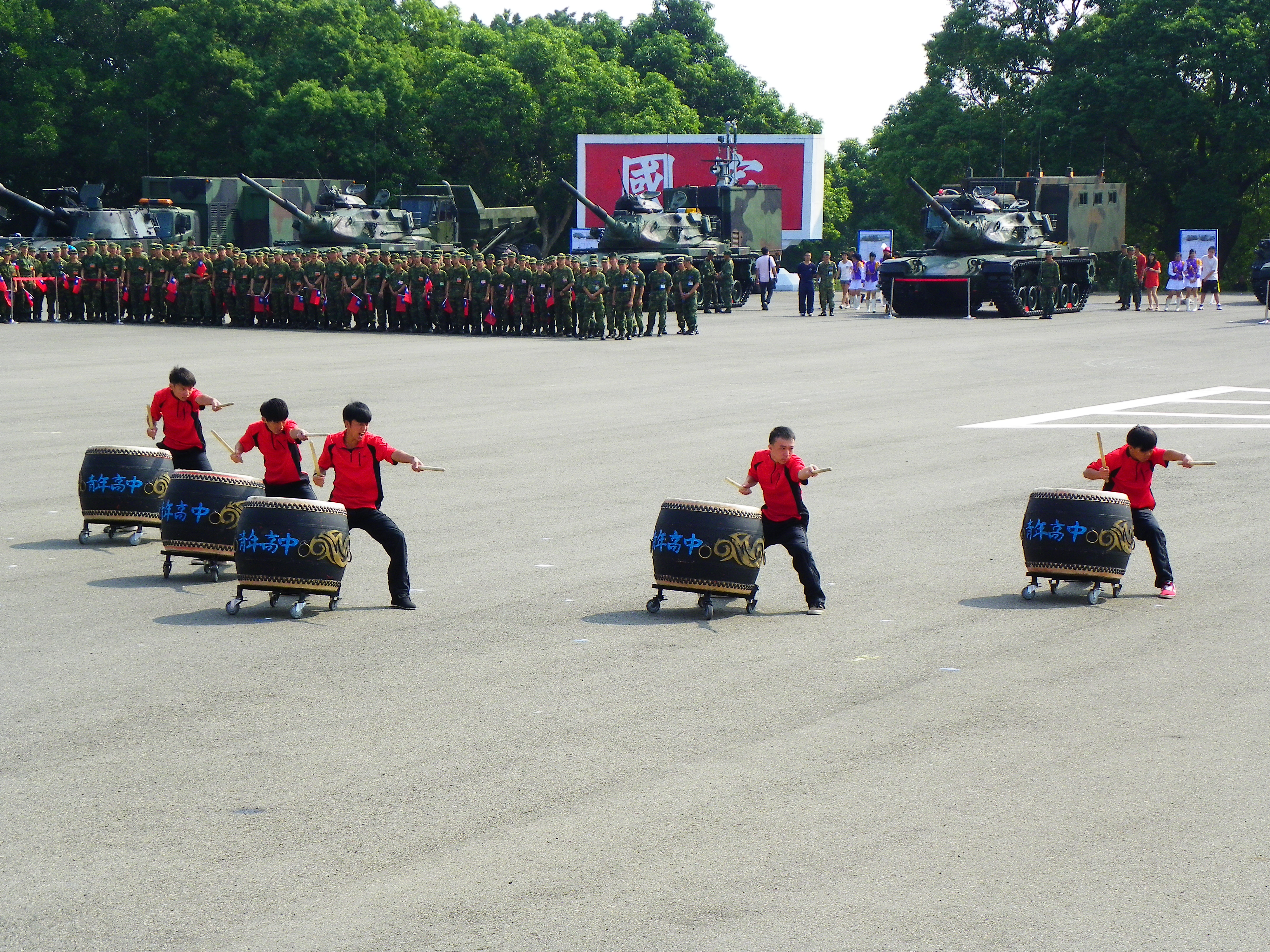 中文（台灣）: 2012年成功嶺營區開放活動，開場青年高中大鼓隊的演出。